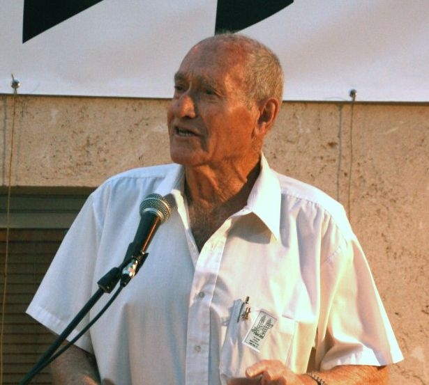 after File:Yeshaayahu Gavish.JPG